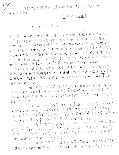 Lettera di Tesfazion Deres all'imperatore Hailè Selasiè. Il fratello dell'eroe nazionale eritreo Zerai Deres riteneva che questi stesse bene e vivo in una prigione in Italia. Tesfazion Deres e altri eritrei interessati contattarono il ministro degli affari esteri Ambaye Wolde Mariam al fine di presentare il caso di Zerai Deres alla Corte Imperiale dell'Etiopia. Il fratello scrisse questa lettera personale indirizzata all'Imperatore dell'Etiopia, nella quale riportava che alcune fonti gli avevano riferito che Zerai Deres era stato ferito da arma da fuoco nel 1938, ma non era morto; al contrario era detenuto in un carcere italiano, a Messina in Sicilia. Tesfazion chiese allora che l'imperatore gli mettesse a disposizione un aereo per andare in Italia e riportare a casa suo fratello.